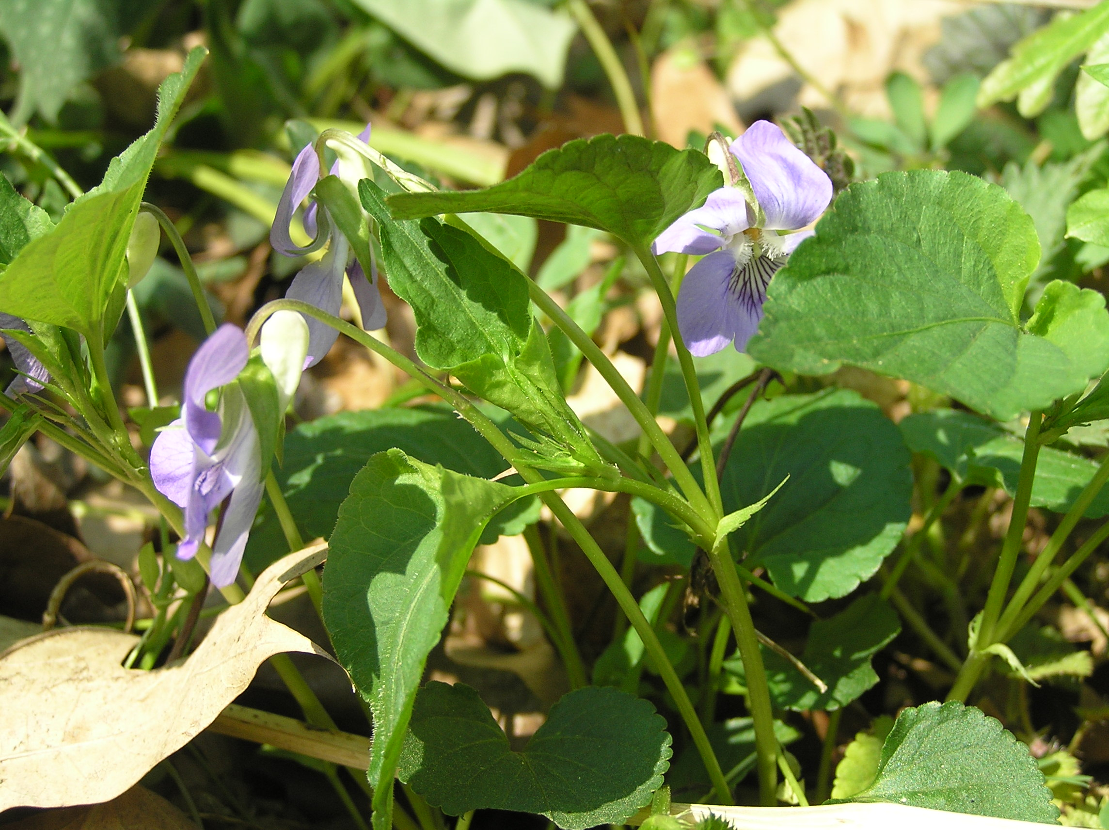 Viola riviniana, Kančí obora near Břeclav, Czech Republic